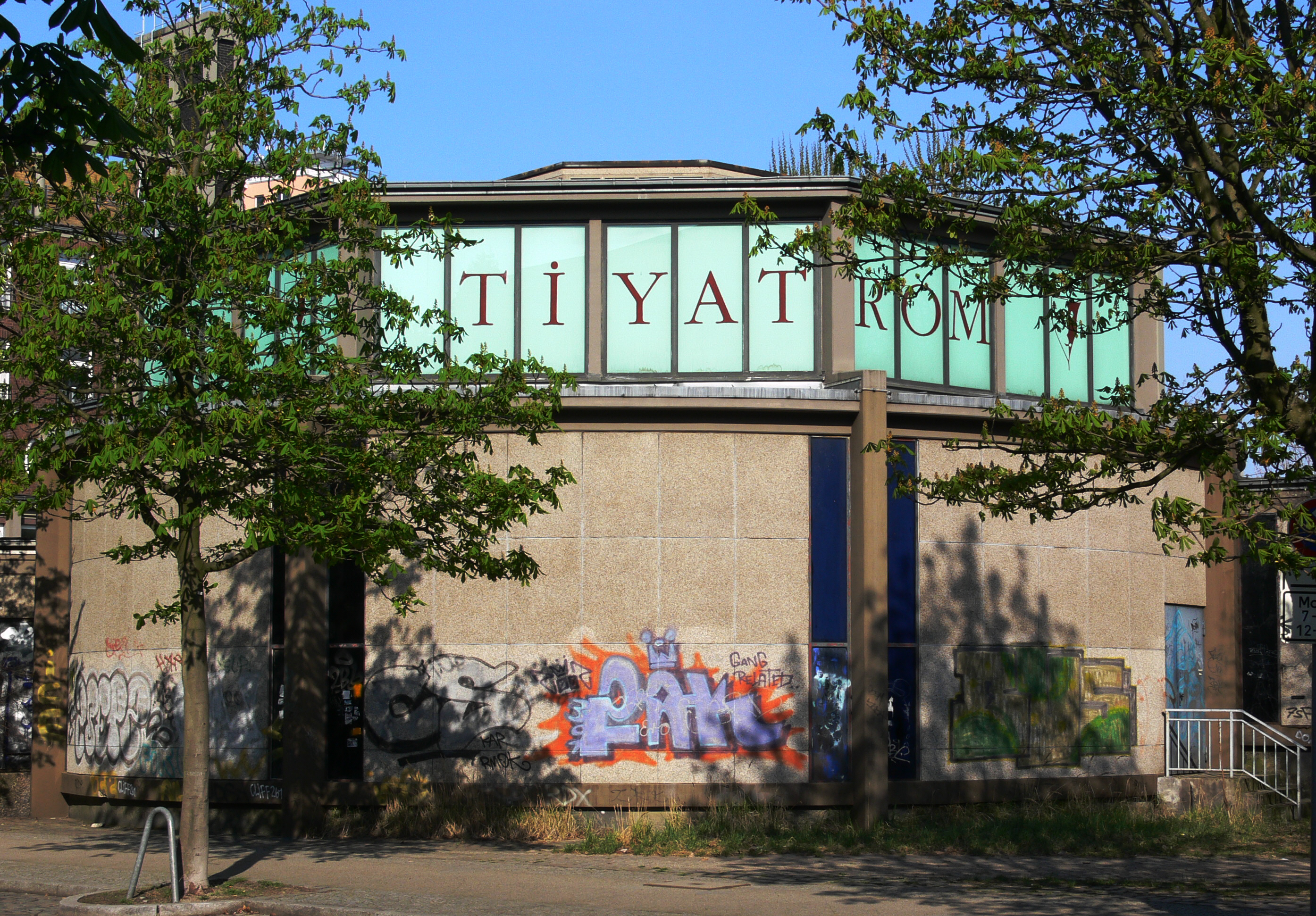 Berlin-Kreuzberg, Alte Jakobstraße, Türkisches Theater "Tiyatrom"